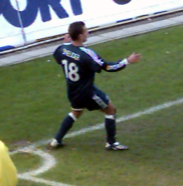 Wesley Sneijder